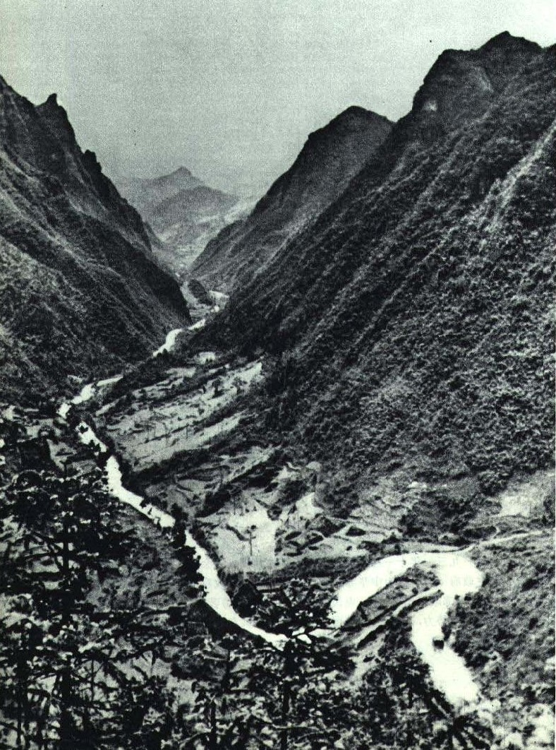 1967-10 1967年娄山关